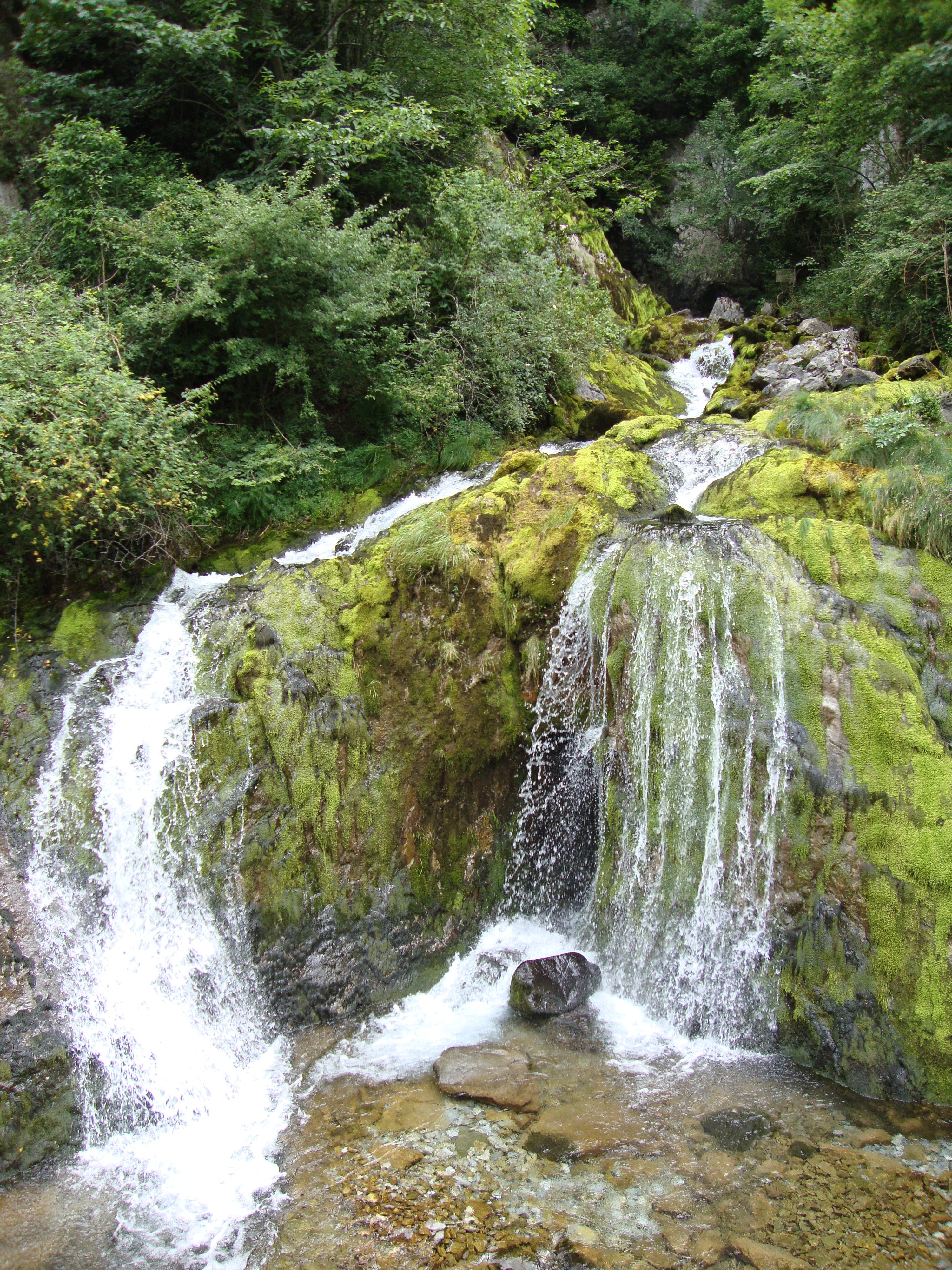 Accous (Pyr-Atl, Fr) Pont d'Esquir, cascade decendant du bois d'Arapoup.